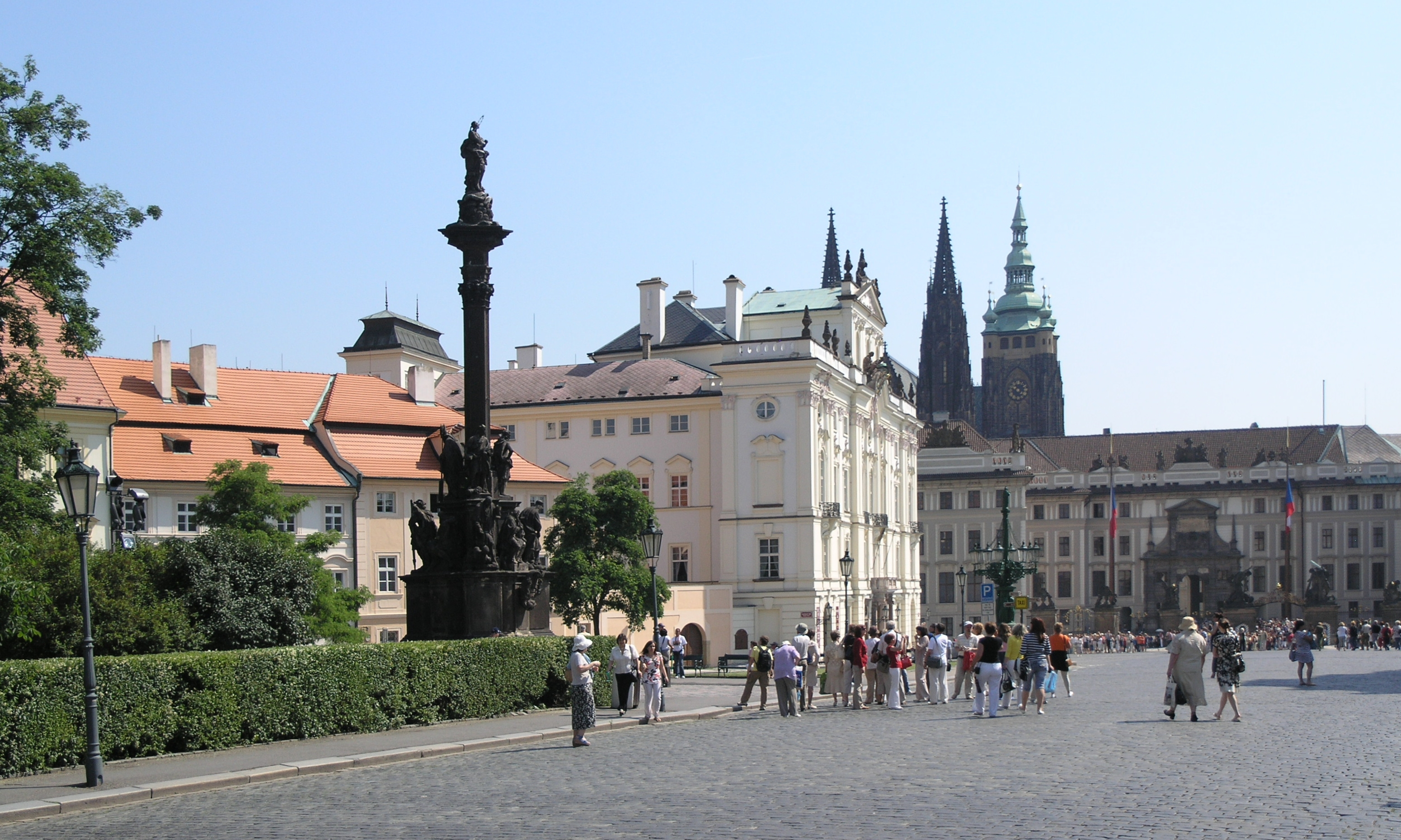 Praha, Hradčanské náměstí